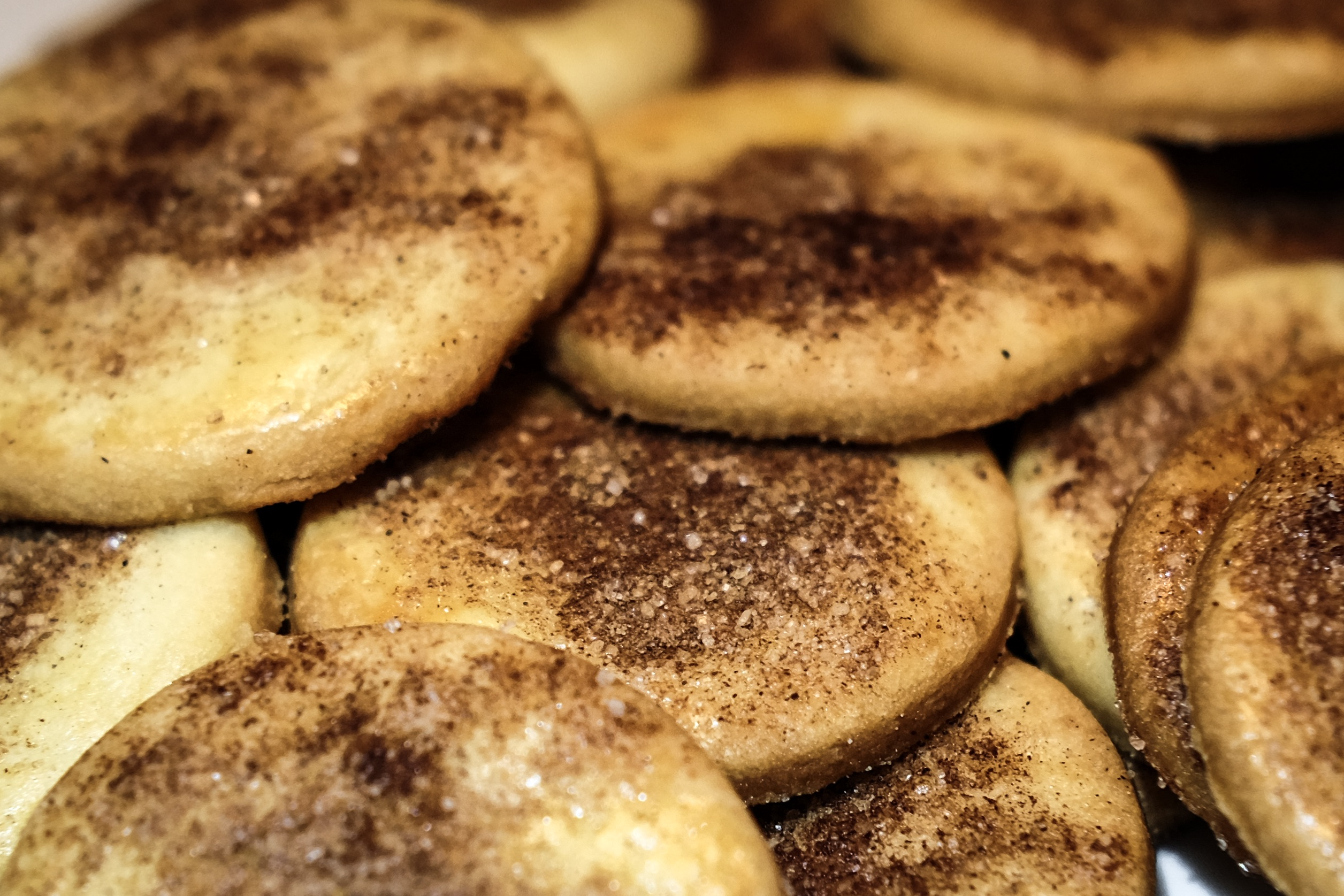 Billede af en klassisk dansk jøde kage (småkage)